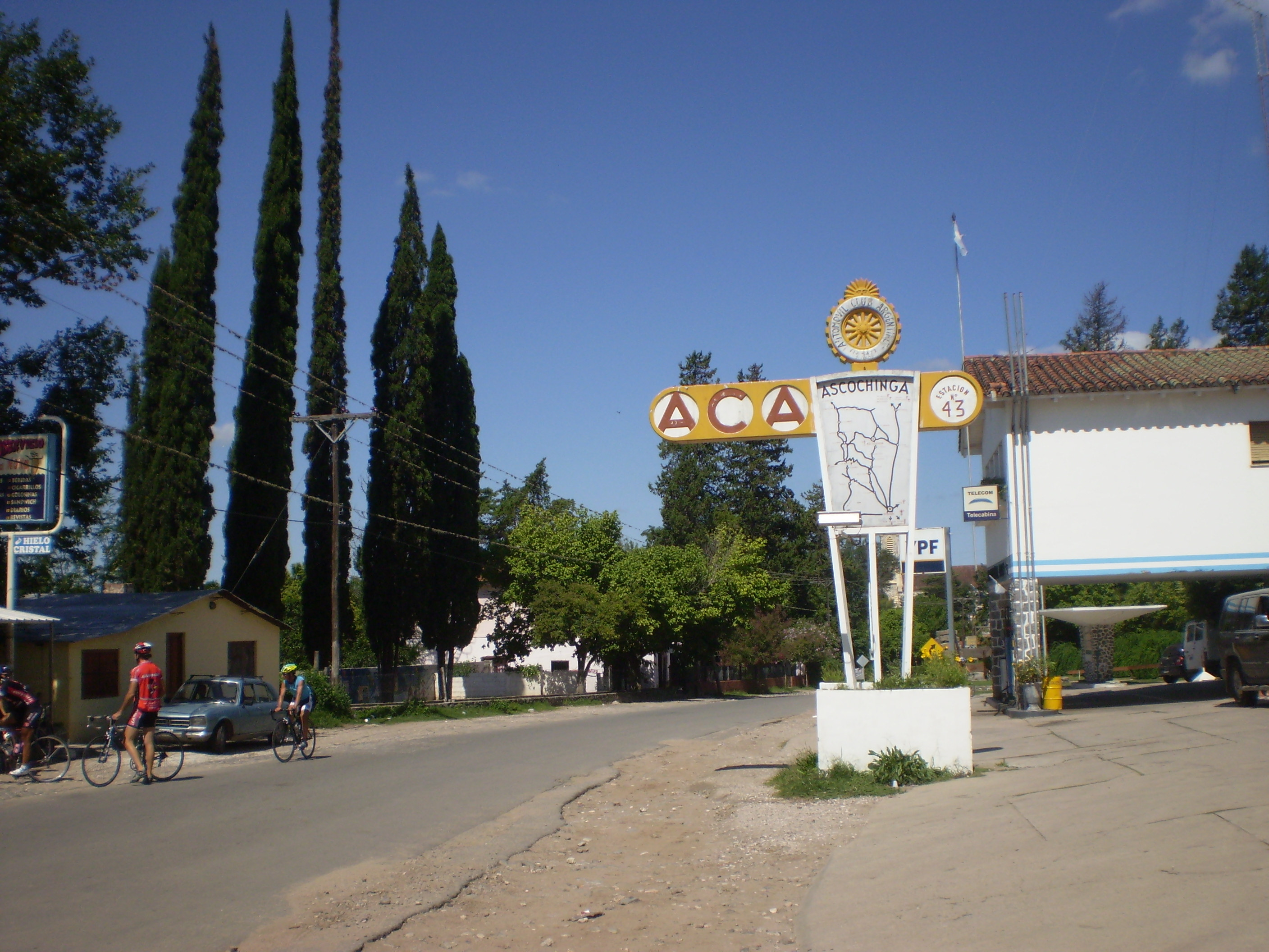 Estación se servicio del Automóvil Club Argentino